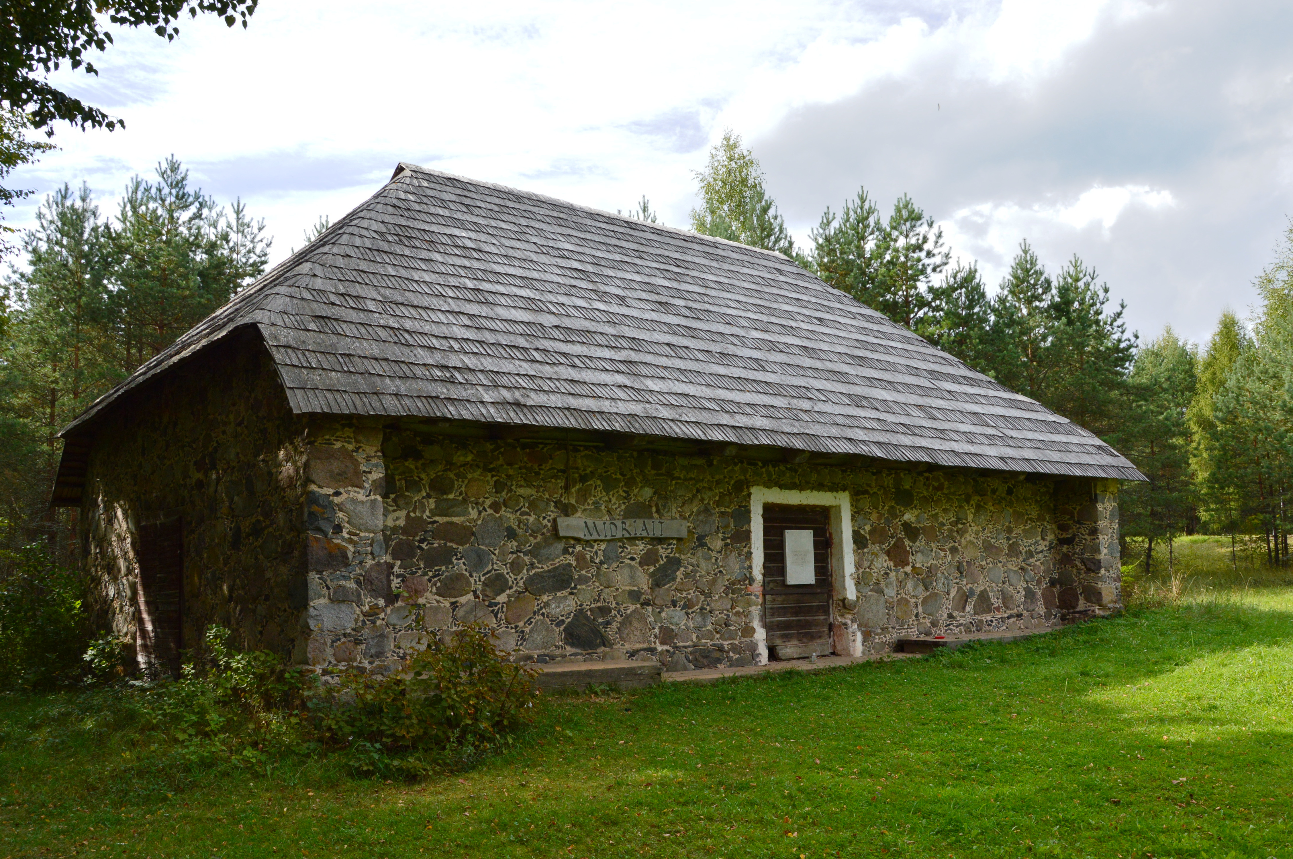 Nursi magasiait